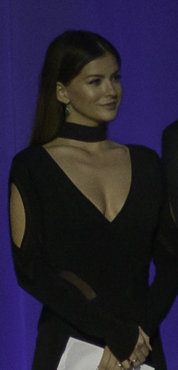 "Es un sueño, un sueño personal, un sueño comunitario, un sueño de un país. Agradezco al esquipo, a los productores y a las actrices", estas fueron las palabras de Jayro Bustamante, director de Ixcanul, al recibir el primer galardón de la noche, en la categoría de la mejor Ópera prima, de los premios Platino. Ref